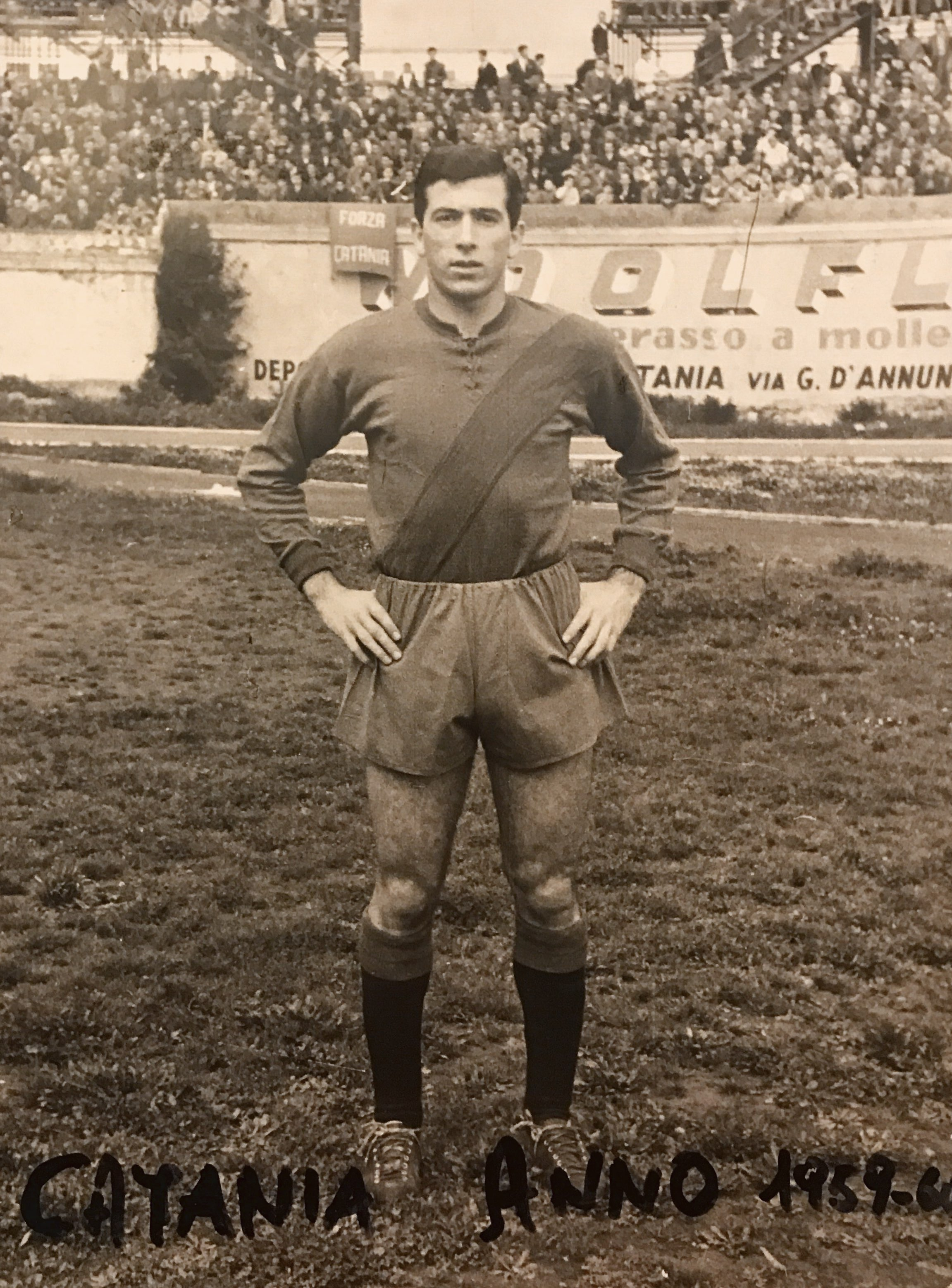 Anno 1959-60 "Serie B" Catania